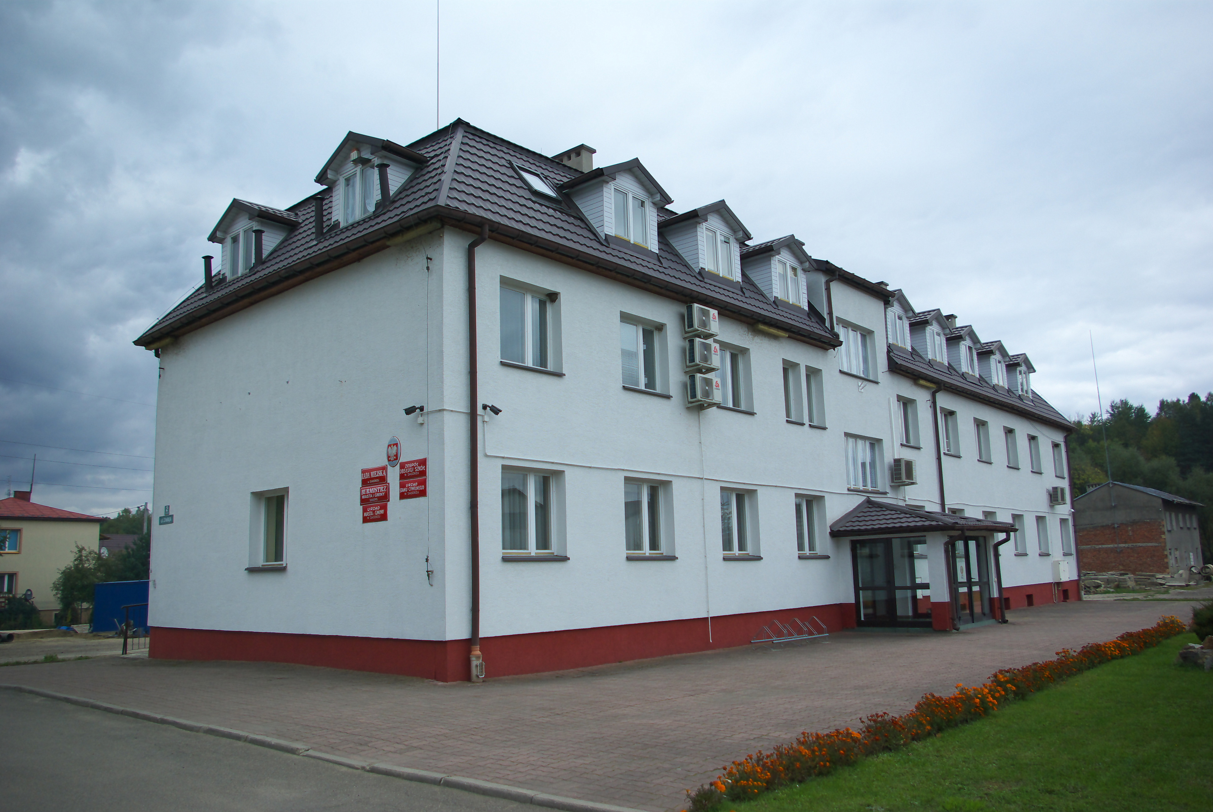 Urząd miasta w Zagórzu przy ulicy 3 Maja 2.